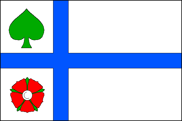 vlajka, Kostelecké Horky, okres Rychnov nad Kněžnou